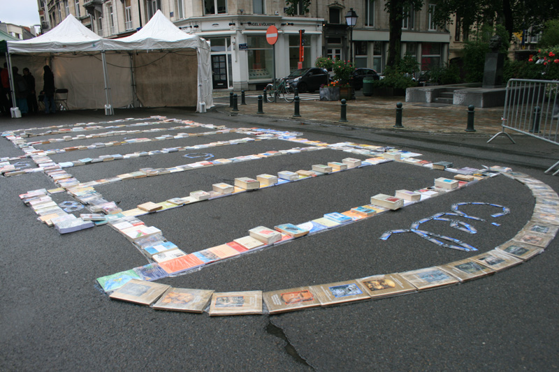 Rayela de libros en homenaje a Julio Cortázar. Place Brugmann, Ixelles (Bruselas), Bélgica.